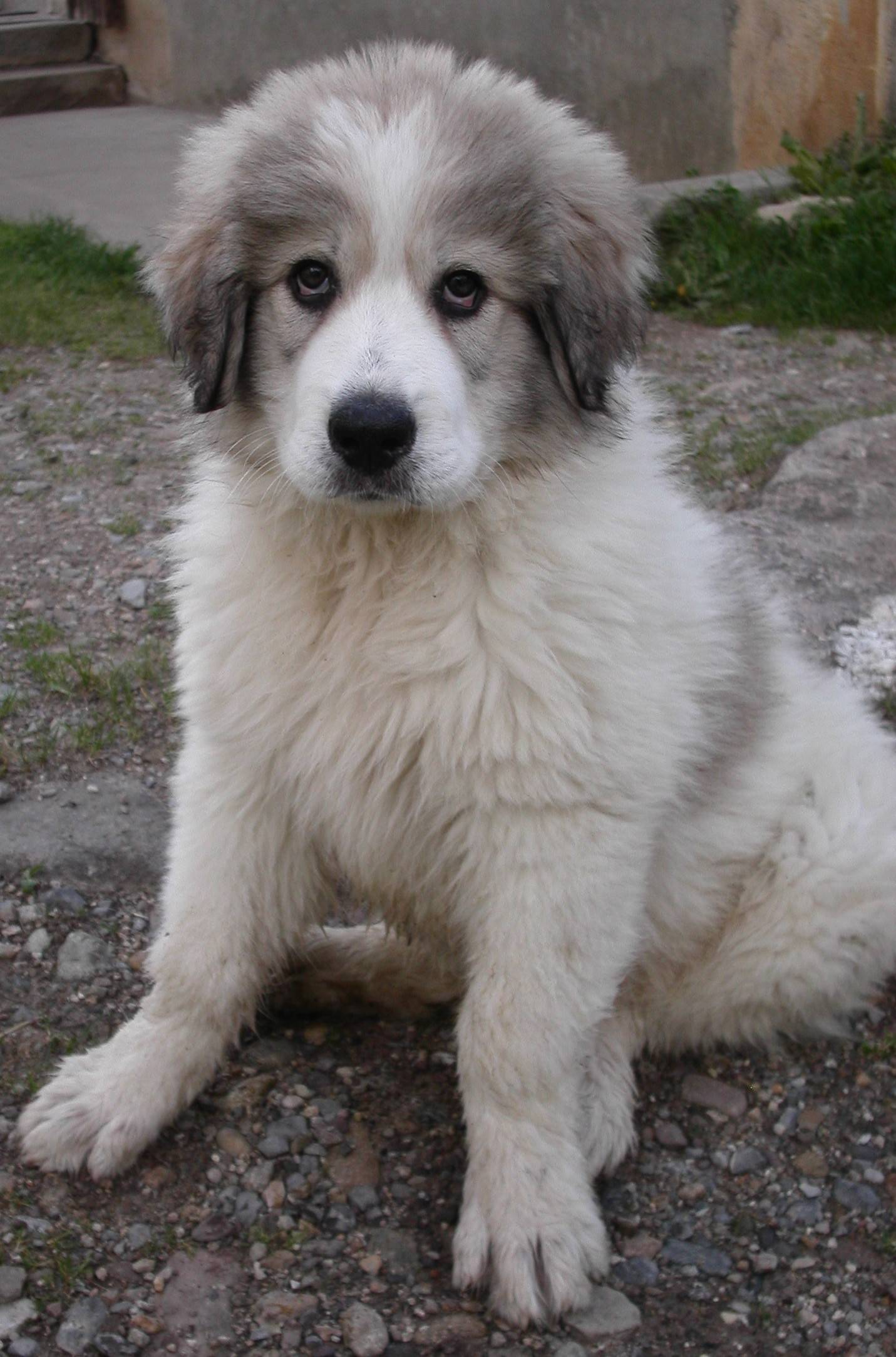 chiot de 2mois, de race "montagne des pyrenees" ou "patou"